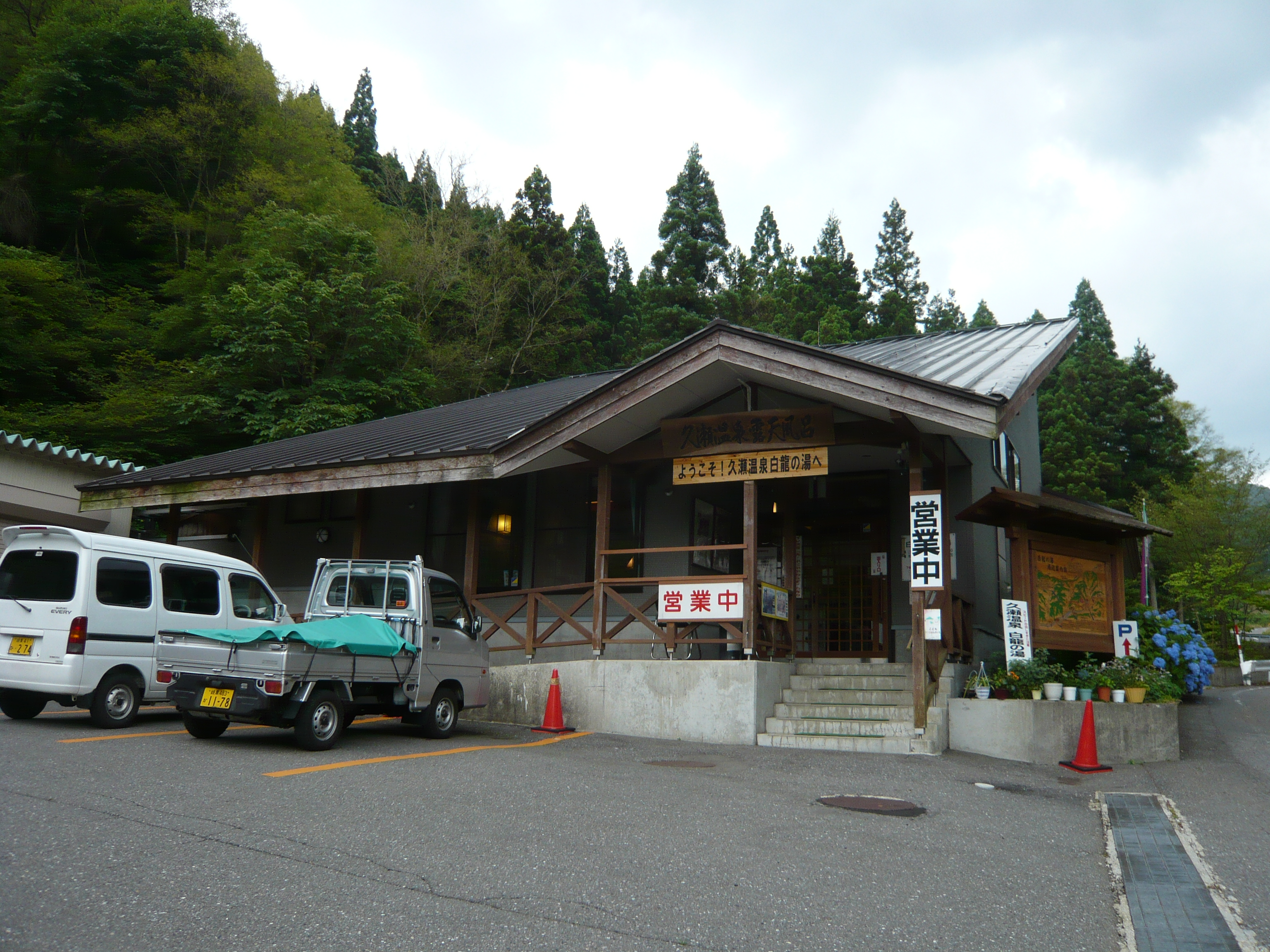 久瀬温泉（旧久瀬村日坂）